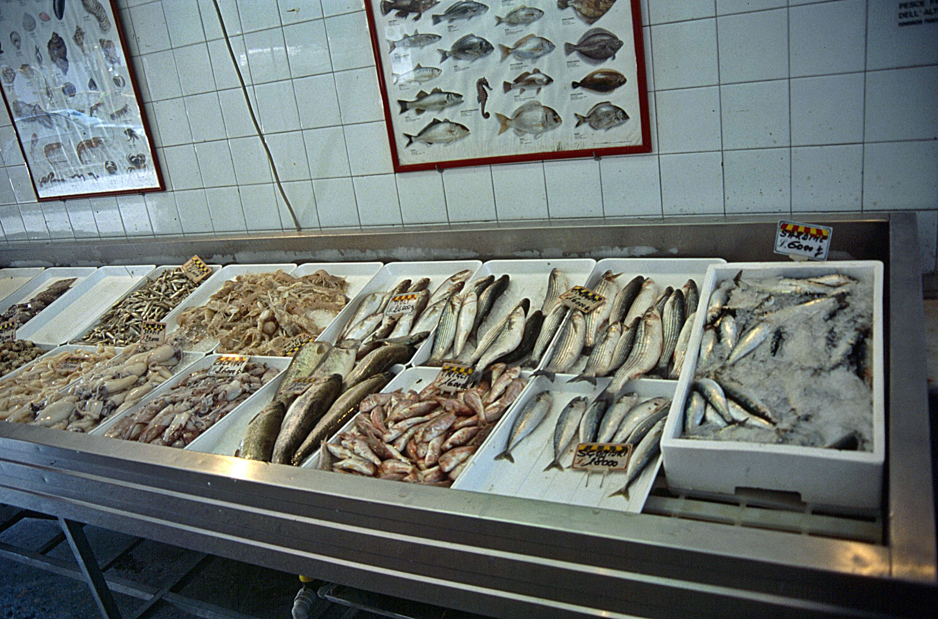 Fischmarkt in Caorle